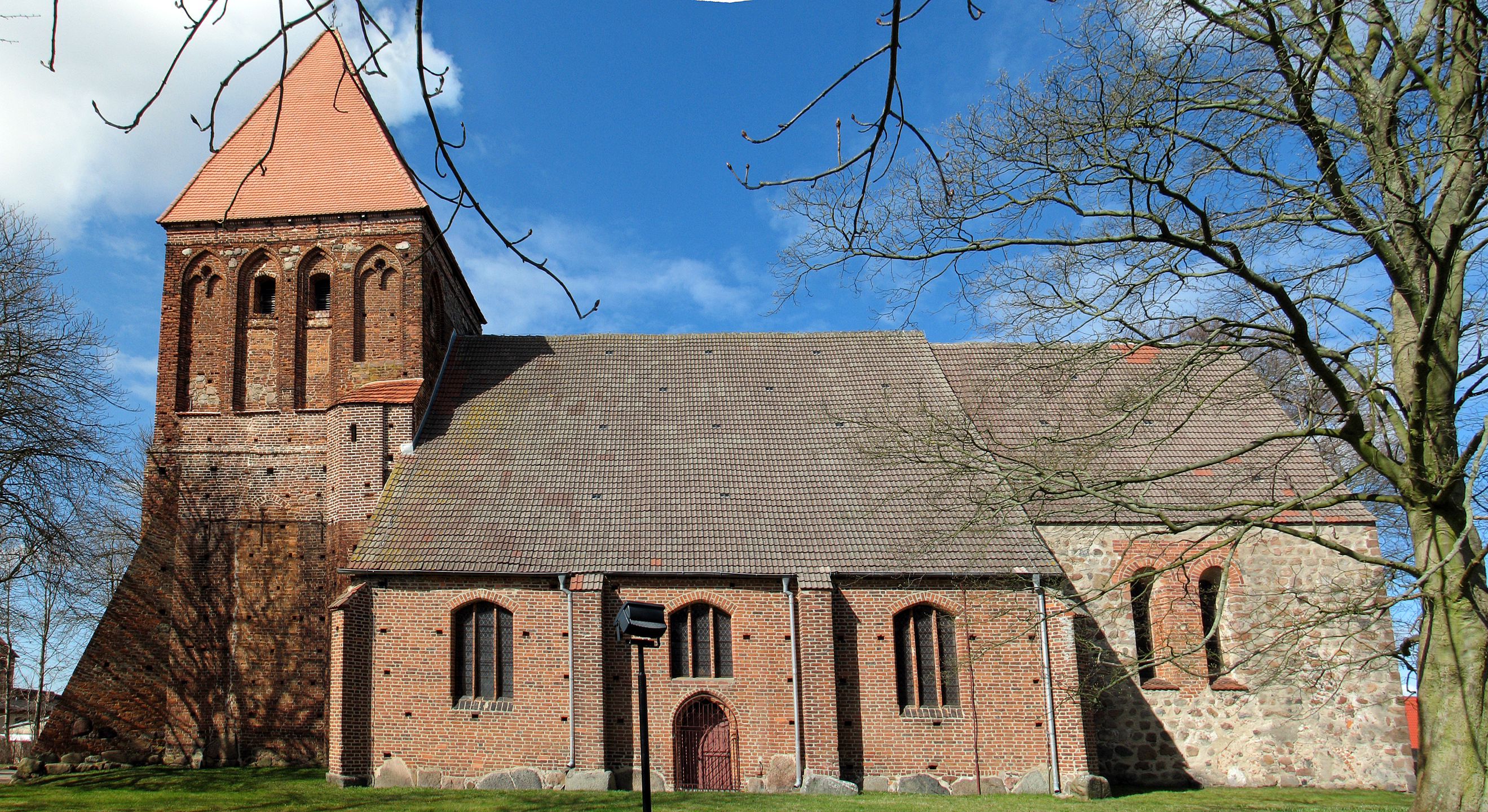 Beschreibung: sideview of church St. Nikolai in Richtenberg Fotograf: Darkone, 14. April 2006